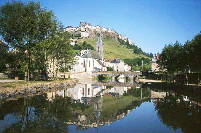 Saint-Flour, vue des berges de l'Ander